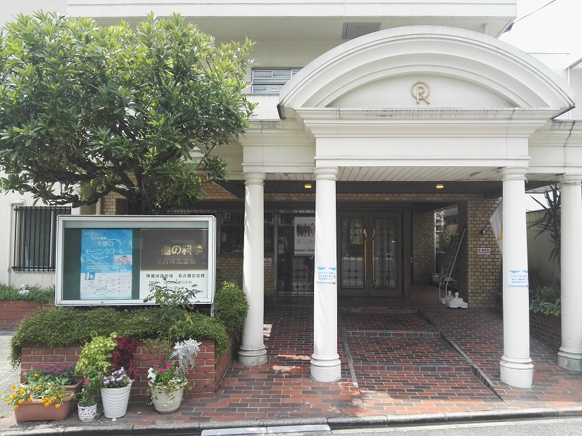 Happy Science Nagoya Kinenkan, Aoi, Nagoya